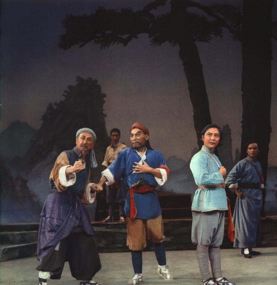 1964-09 1964年 杜鹃山